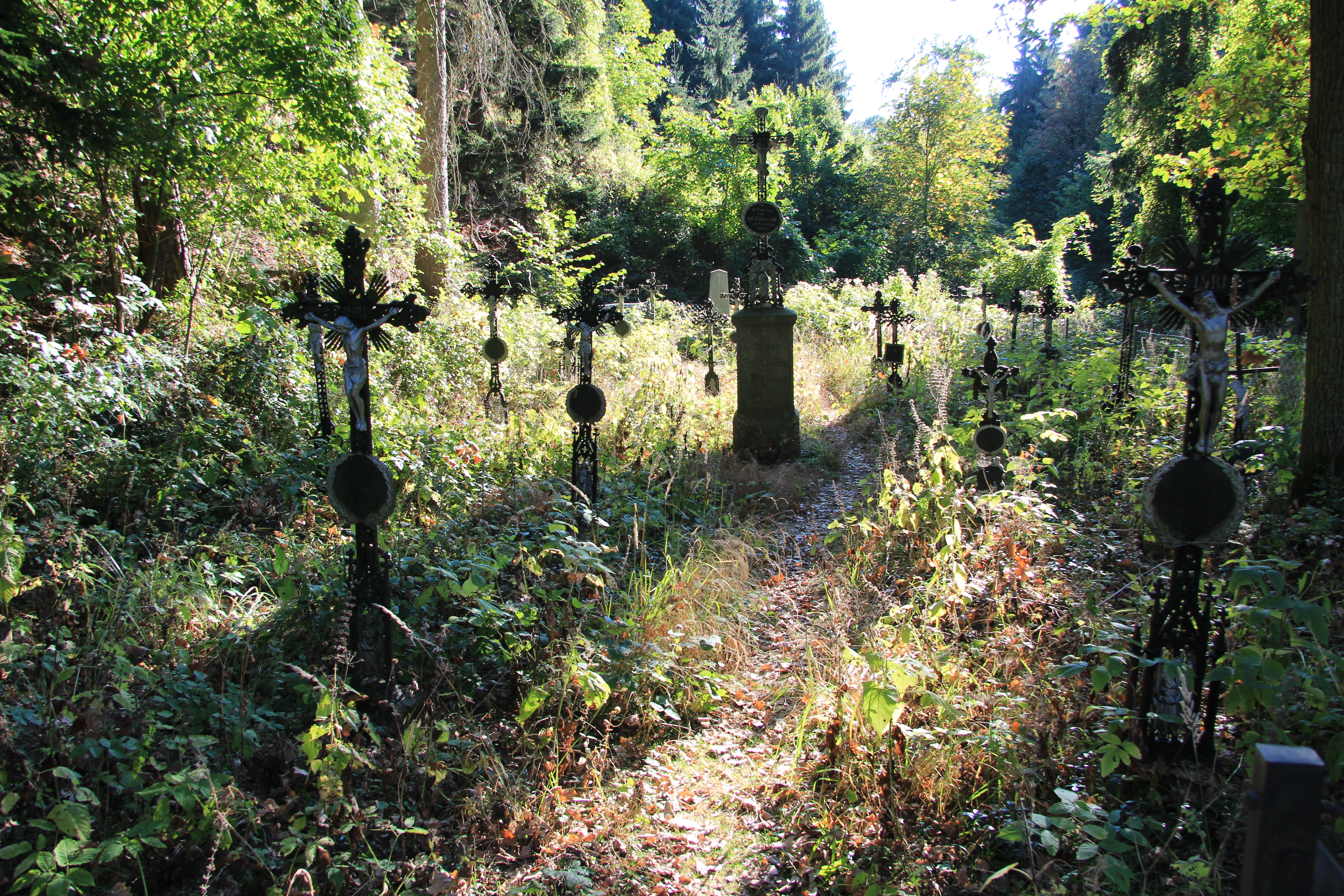 Cholerafriedhof in Maria Dreieichen bei Mold in Niederösterreich